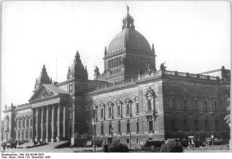 Leipzig, Reichsgerichtsgebäude Zentralbild Sturm 23.1.1956 Leipzig: Das Georgi-Dimitroff-Museum (ehemaliges Reichsgericht)